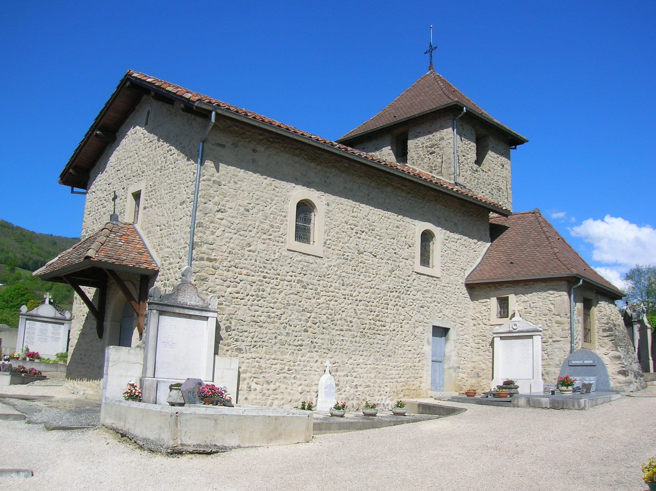 Chapelle des Angonnes, labelisée Patrimoine de l'Isère, à Brié-et-Angonnes, Isère, Rhone-Alpes, France.